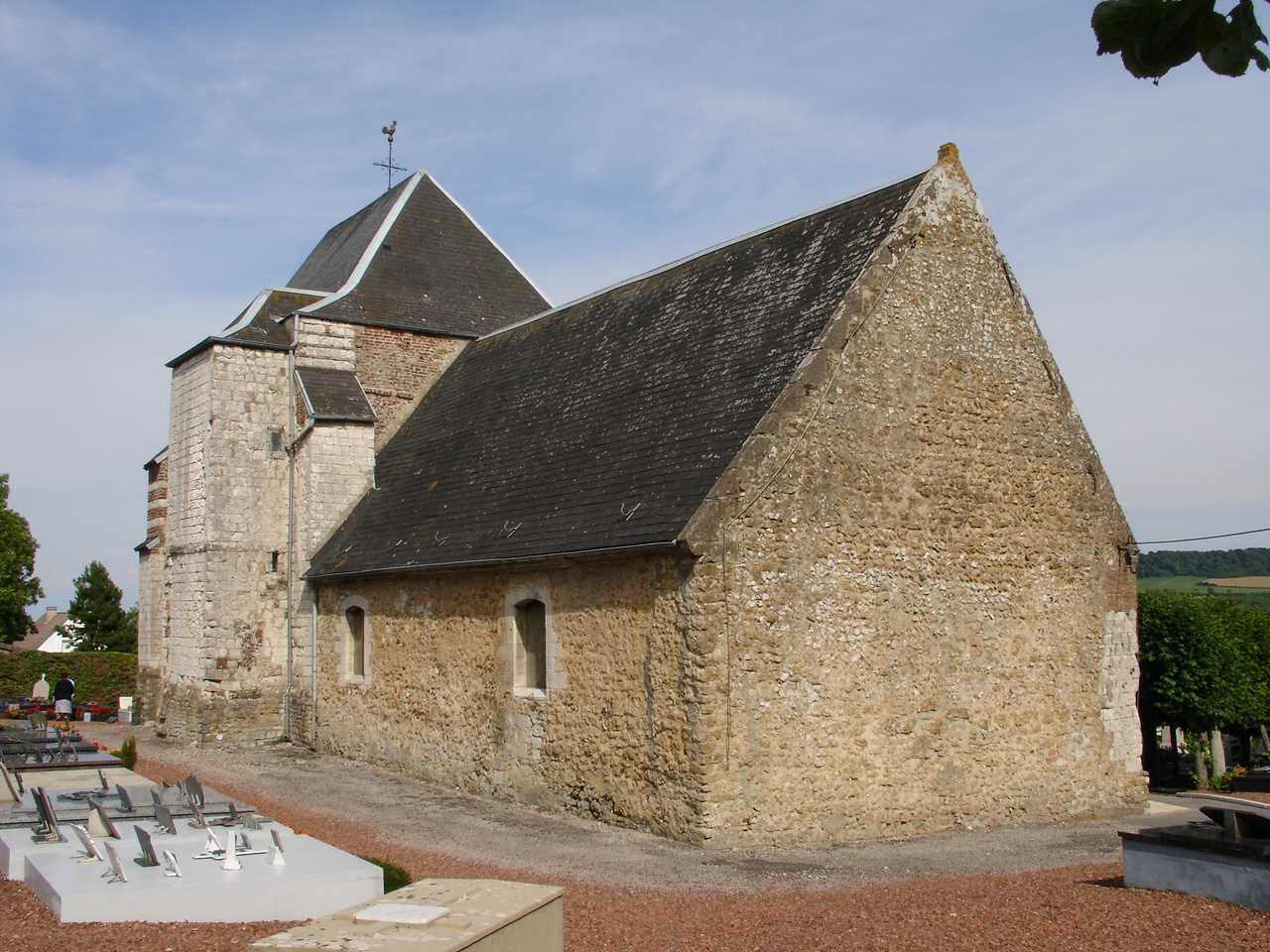 Église de Surques